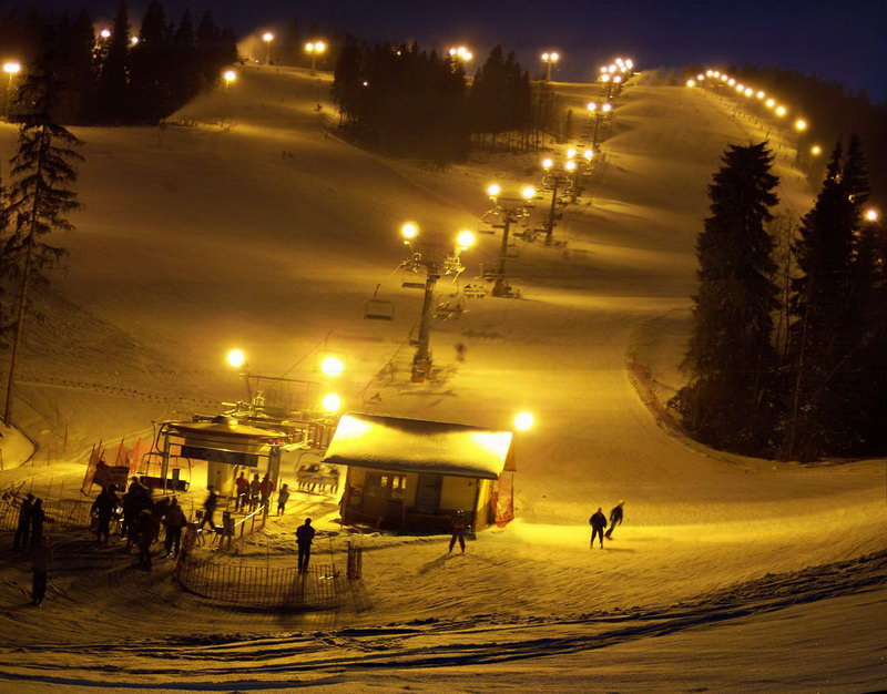 Kotelnica. Wyciąg narciarski nocą.